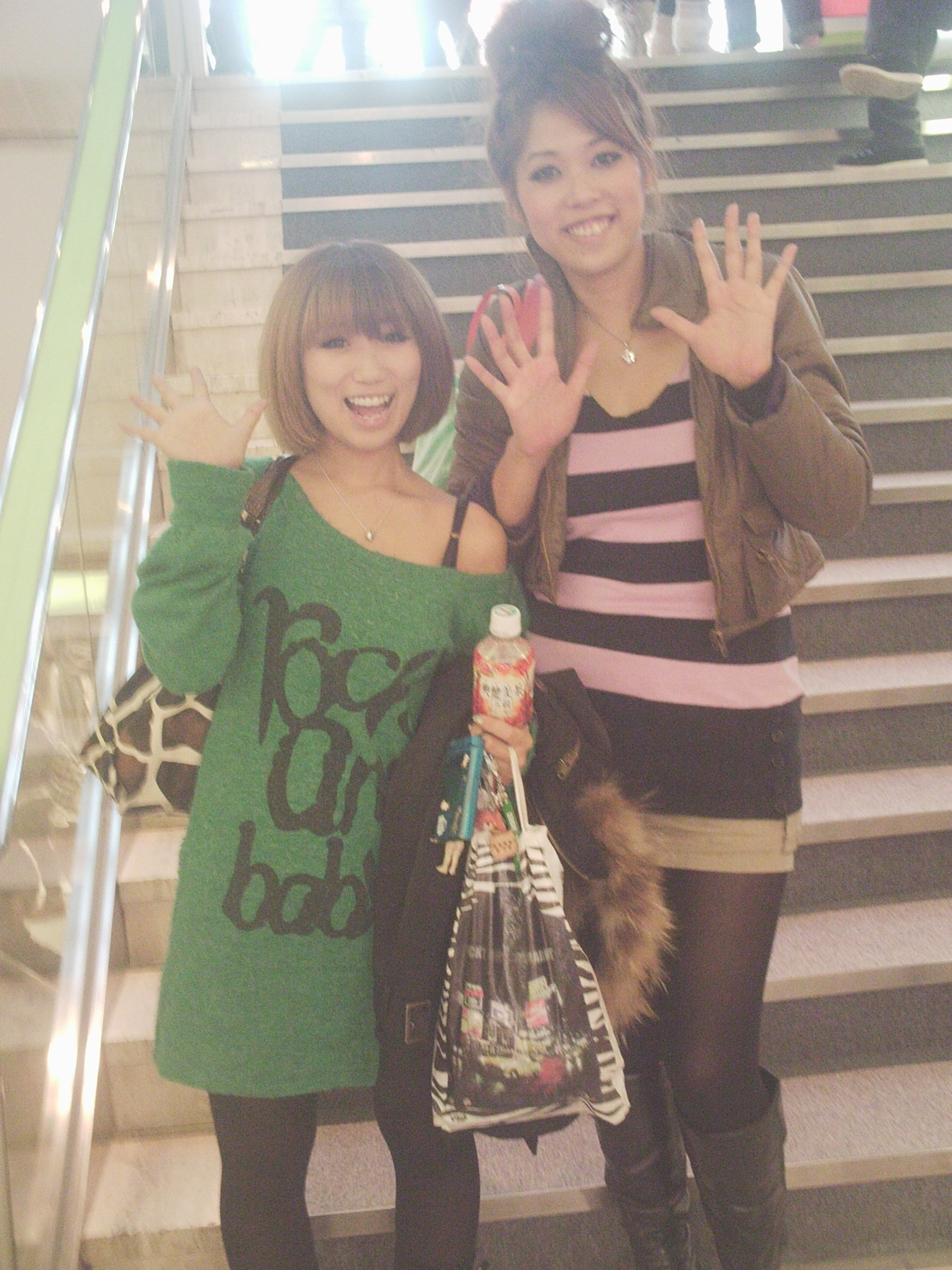 すっとんきょ (2009年11月)